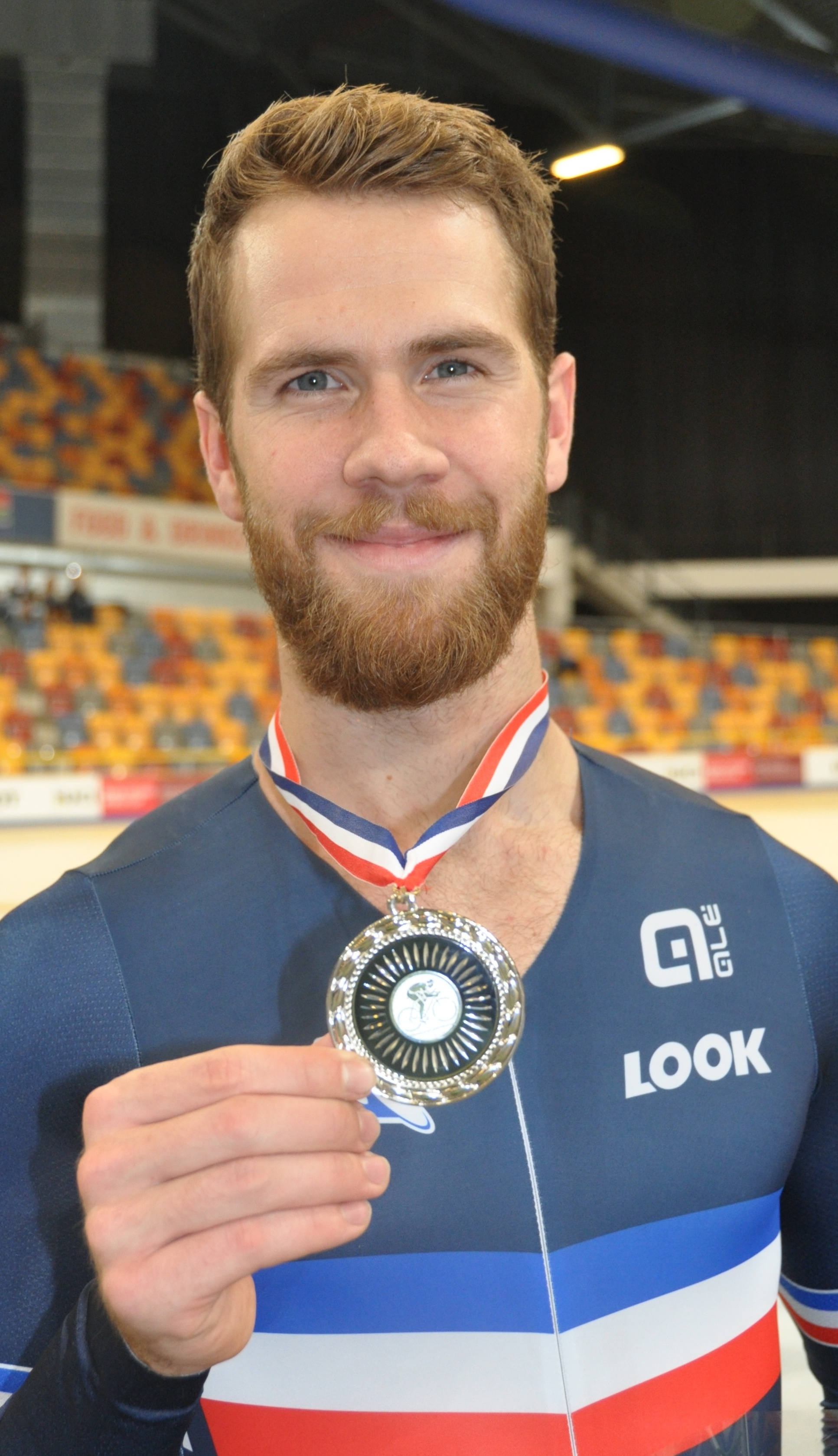 Benjamin Edelin, französischer Radsportler, Silbermedaille im Teamsprint